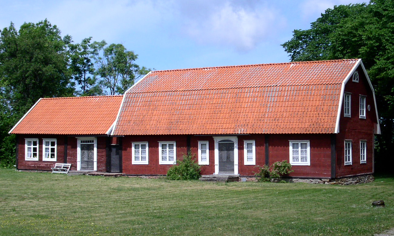 Bostadshus uppfört i skiftesverksteknik, Gärdslösa socken, Öland